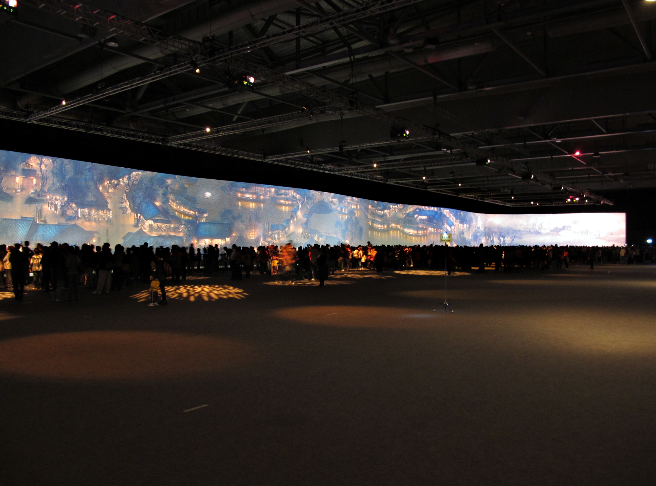 HK Arena Riverside of Wisdom 香港展出的清明上河圖(電子動態版)展覽